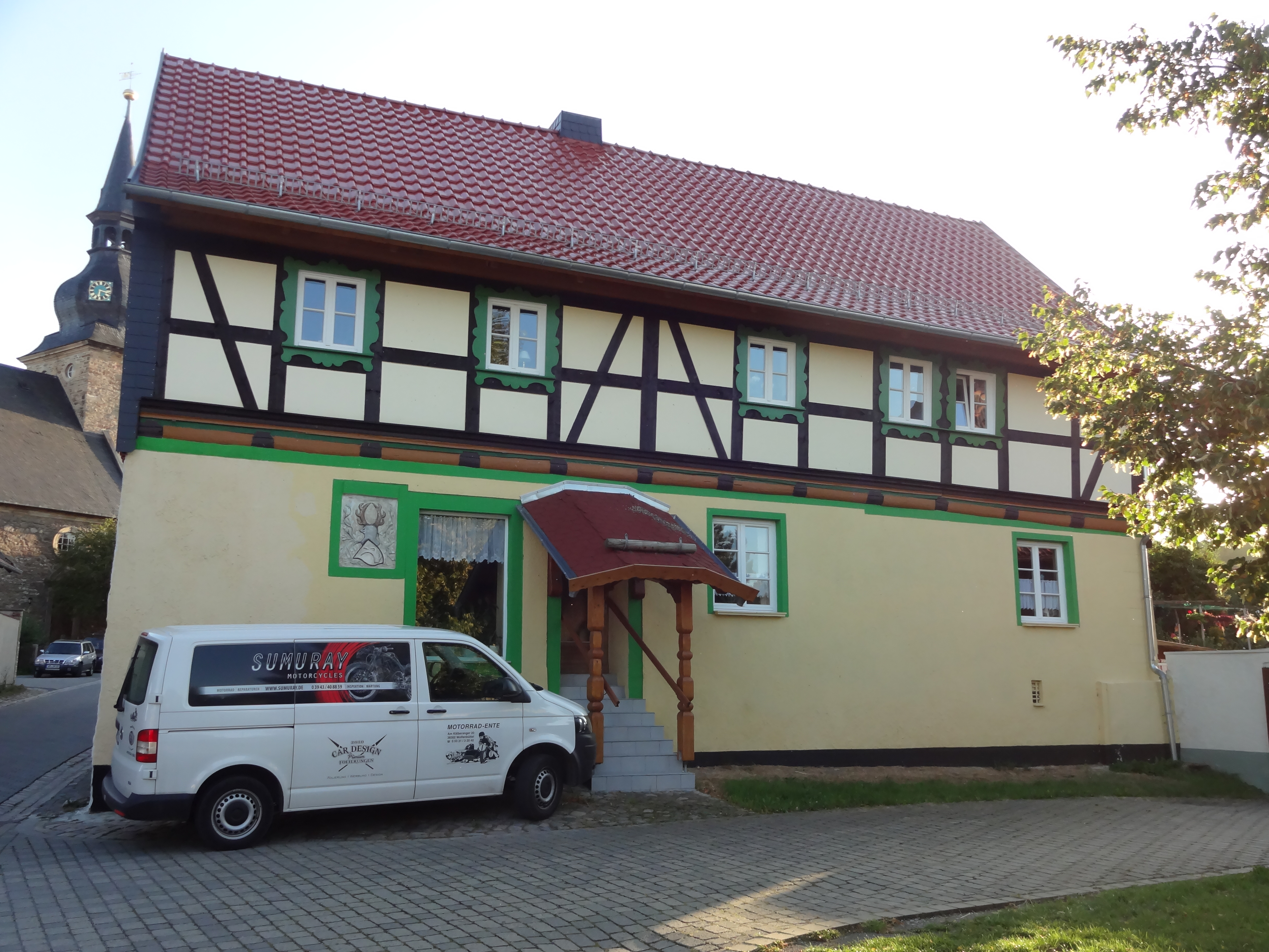 denkmalgeschütztes Wohnhaus in der Straße Oberdorf 1 in Heimburg